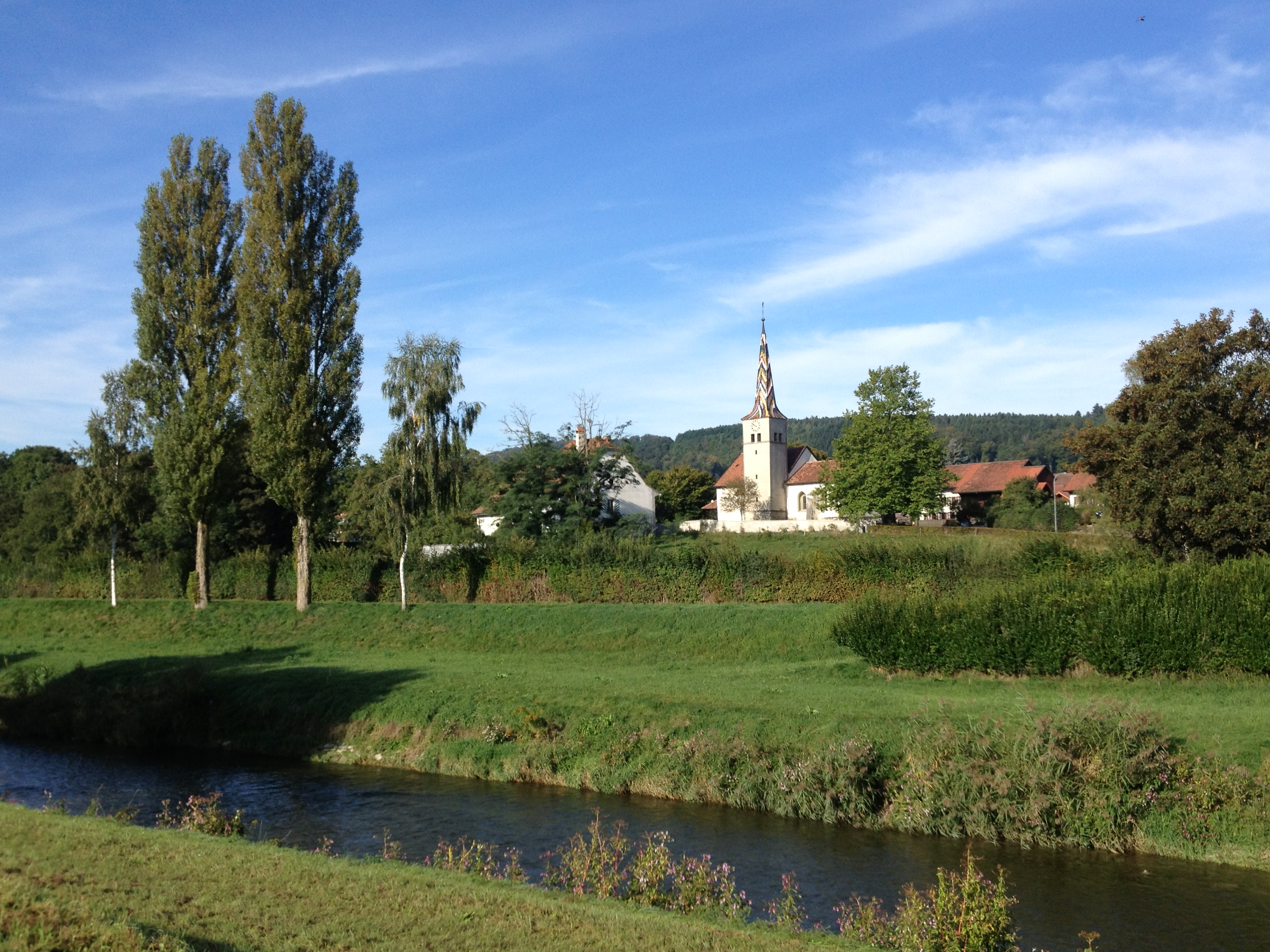 L'église Notre-Dame de Granges-près-Marnand et la Broye.